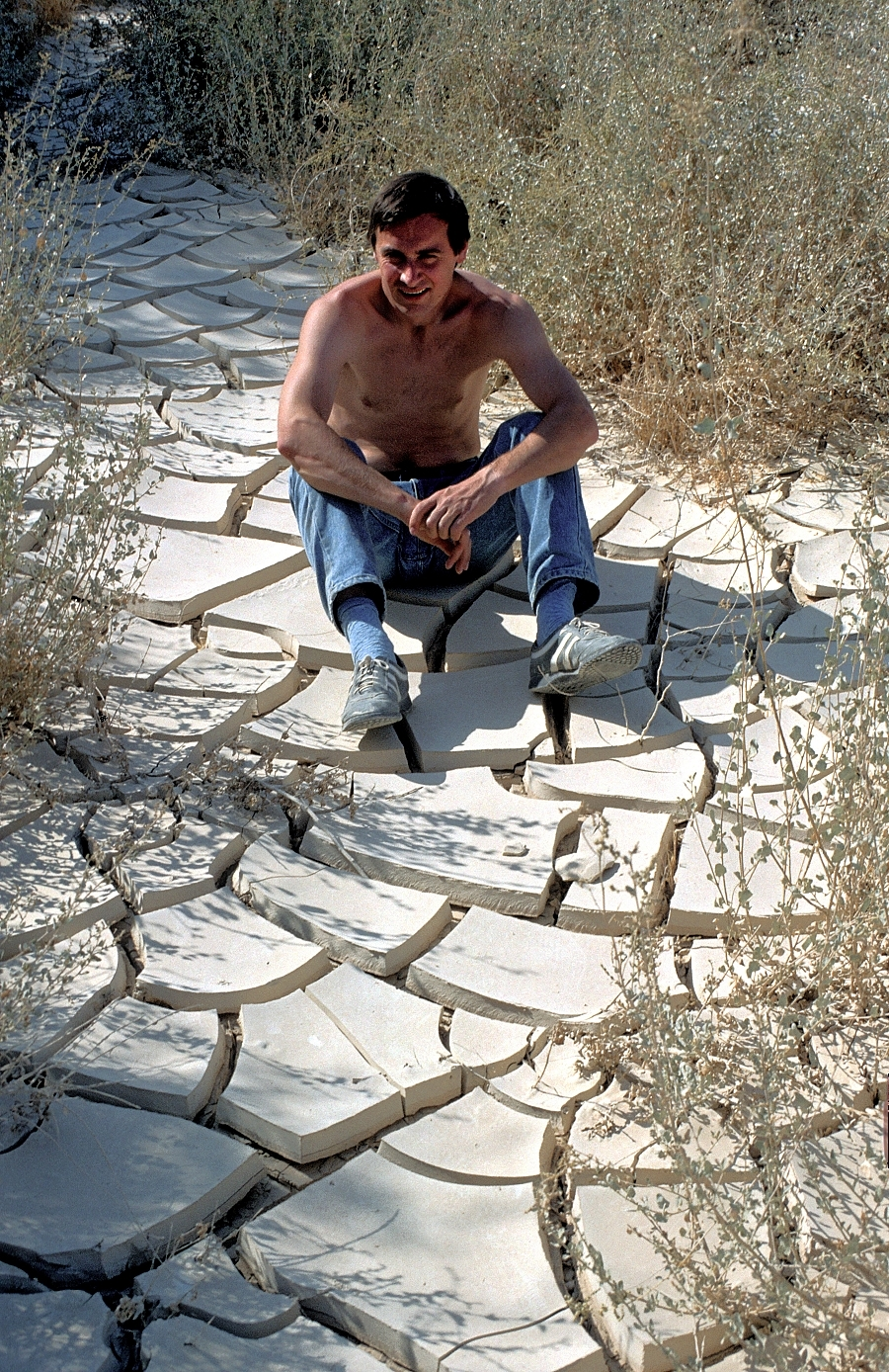 Иван Юрьевич Чернов изучает такыры в Бухарской области Узбекистана, 1991 г.